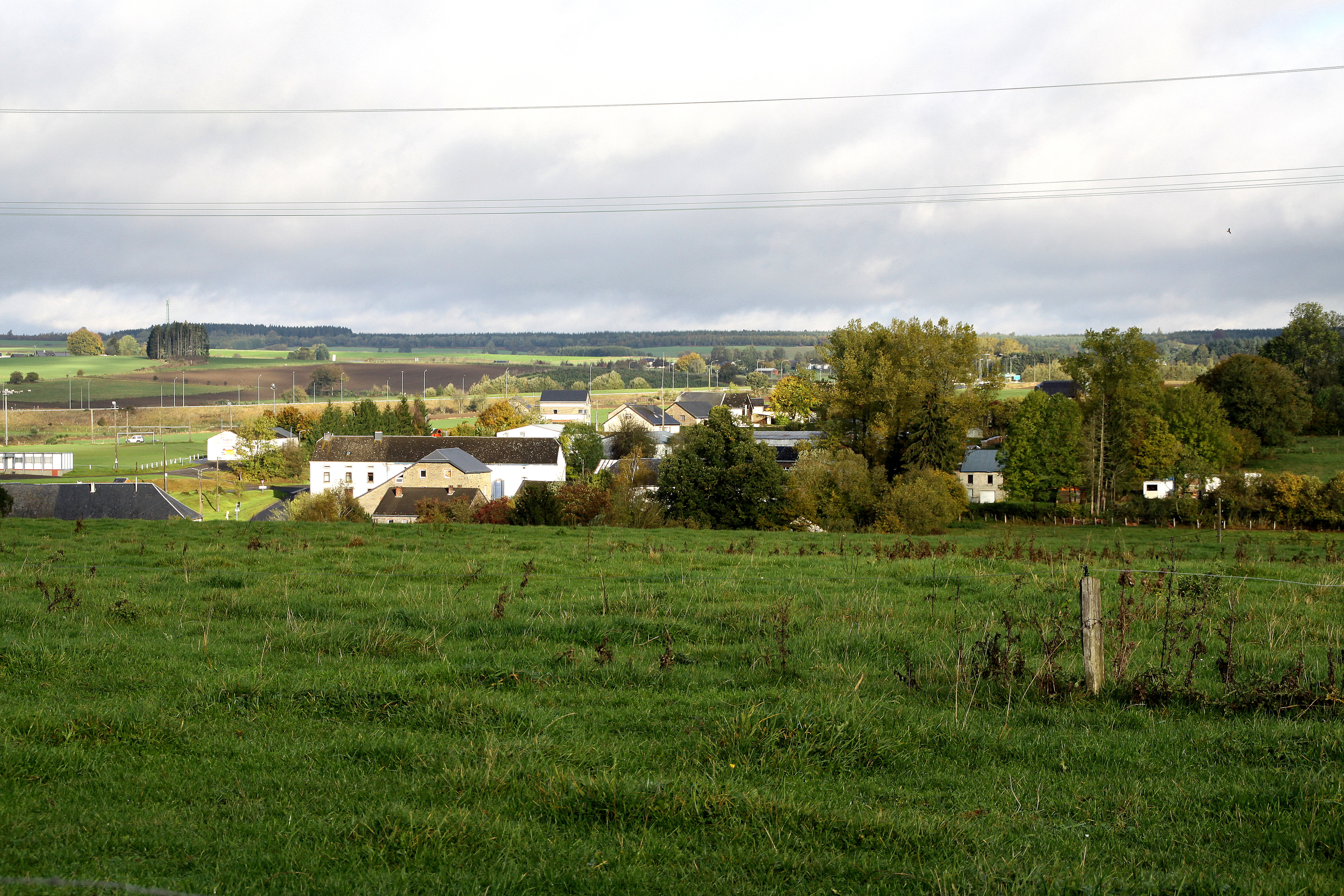 Cobreville am Oktober 2014